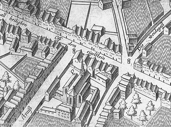 Kloster und Kirche der Benediktinerinnen "Zu den hl.Machabäern". Plan der Stadt Köln von Arnold Merkator 1571